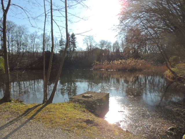 laghetto artificiale